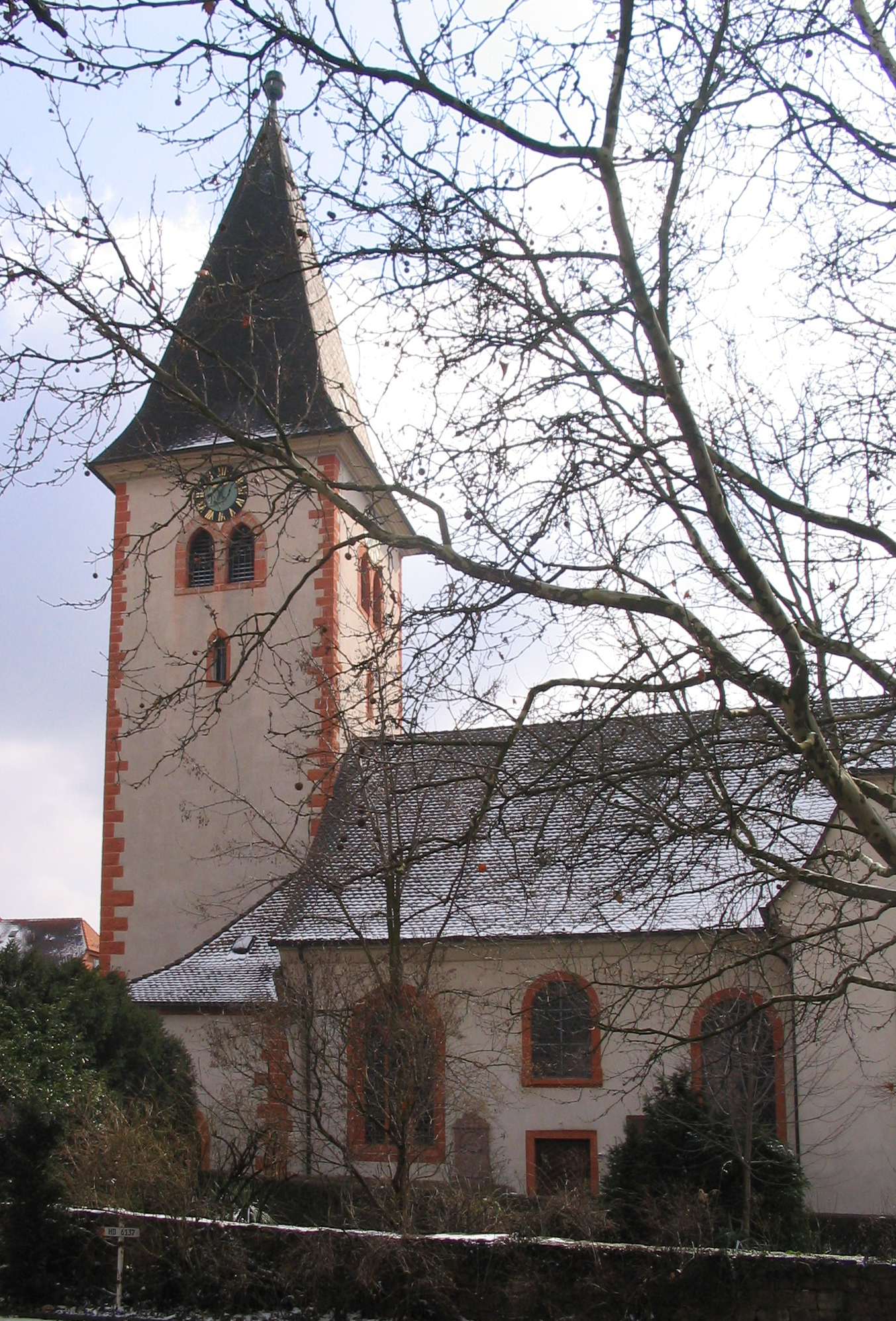 Evangelische Kirche in Leimen (Baden Württemberg).